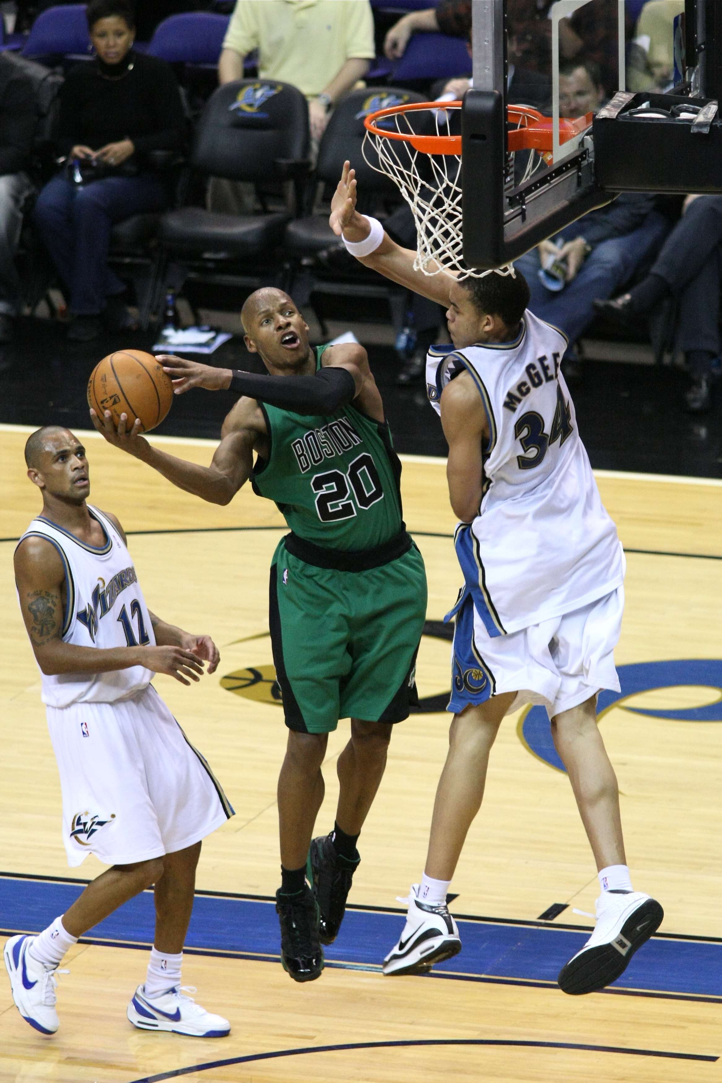 Ray Allen, joueur des Celtics de Boston